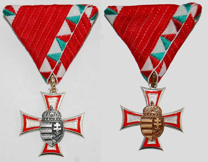 LEGÉNYSÉGI SZOLGÁLATI JELEK TÉVES SZALAGON-10-5 éves szolgálat után (1992)